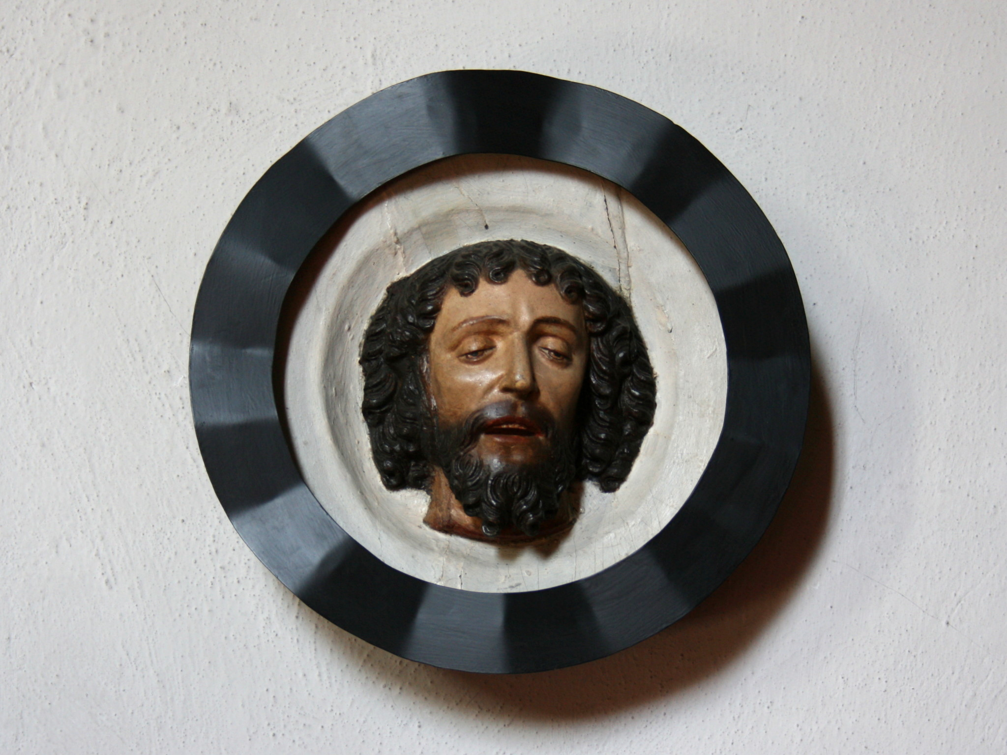 Sankt Johann Baptist in Marienheide-Gimborn